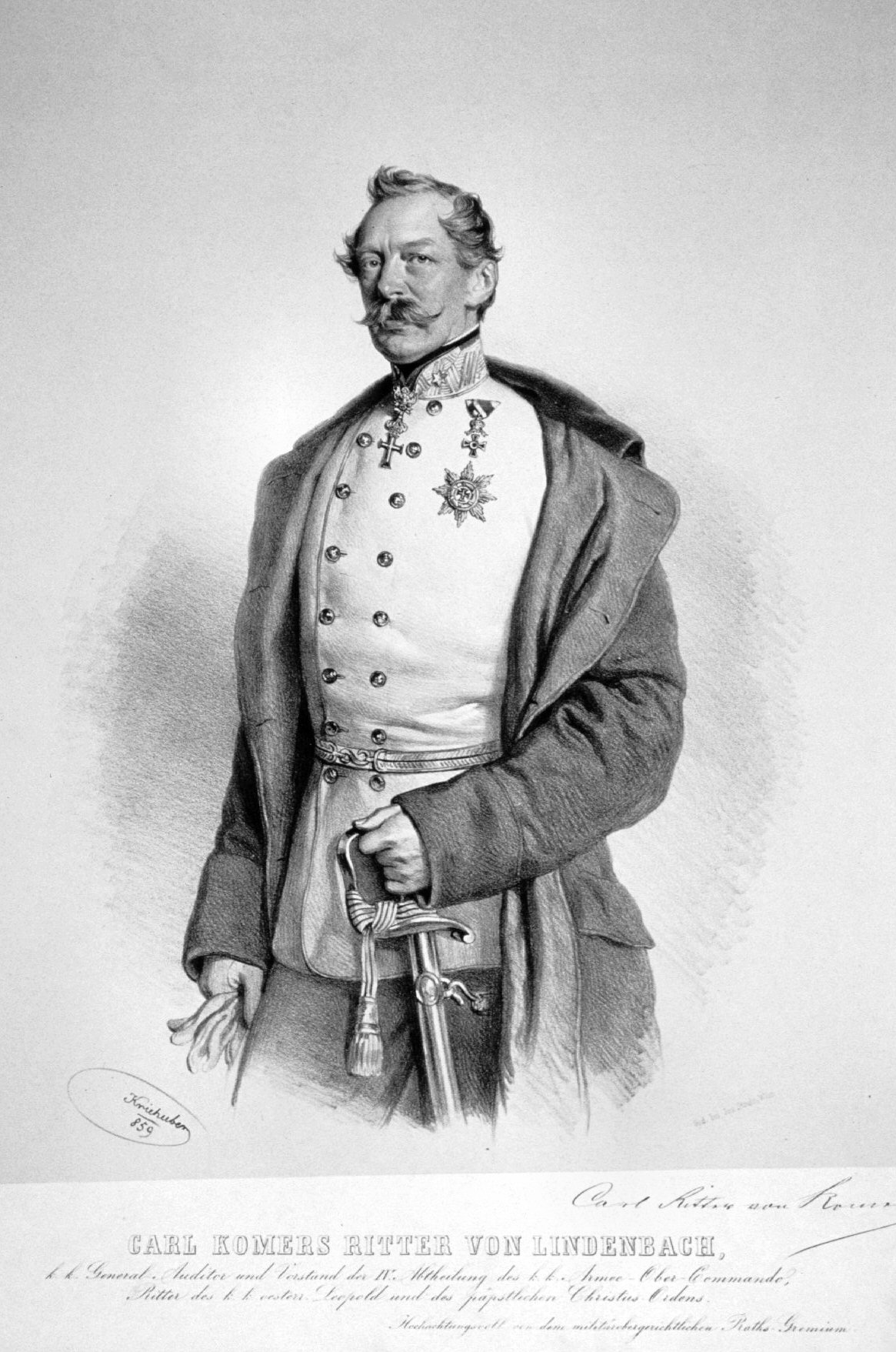 Karl Eduard von Komers (1797-1870), Freiherr, Militärjurist, Generalauditor, Hofrat. Lithographie von Josef Kriehuber, 1859